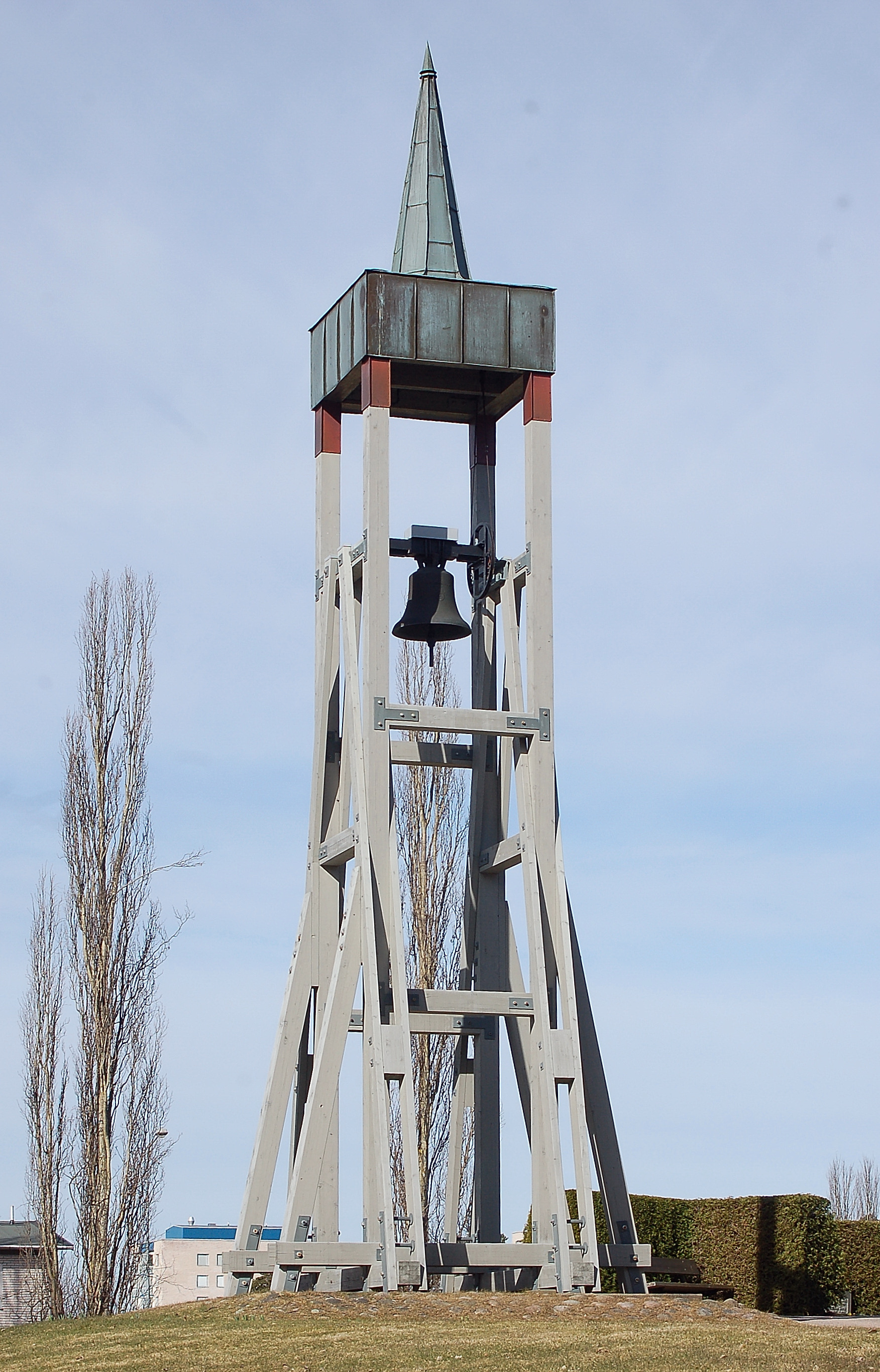 Klockstapel på Ruds kyrkogård. Byggnadsår 1975. Arkitekt Åke Porne.